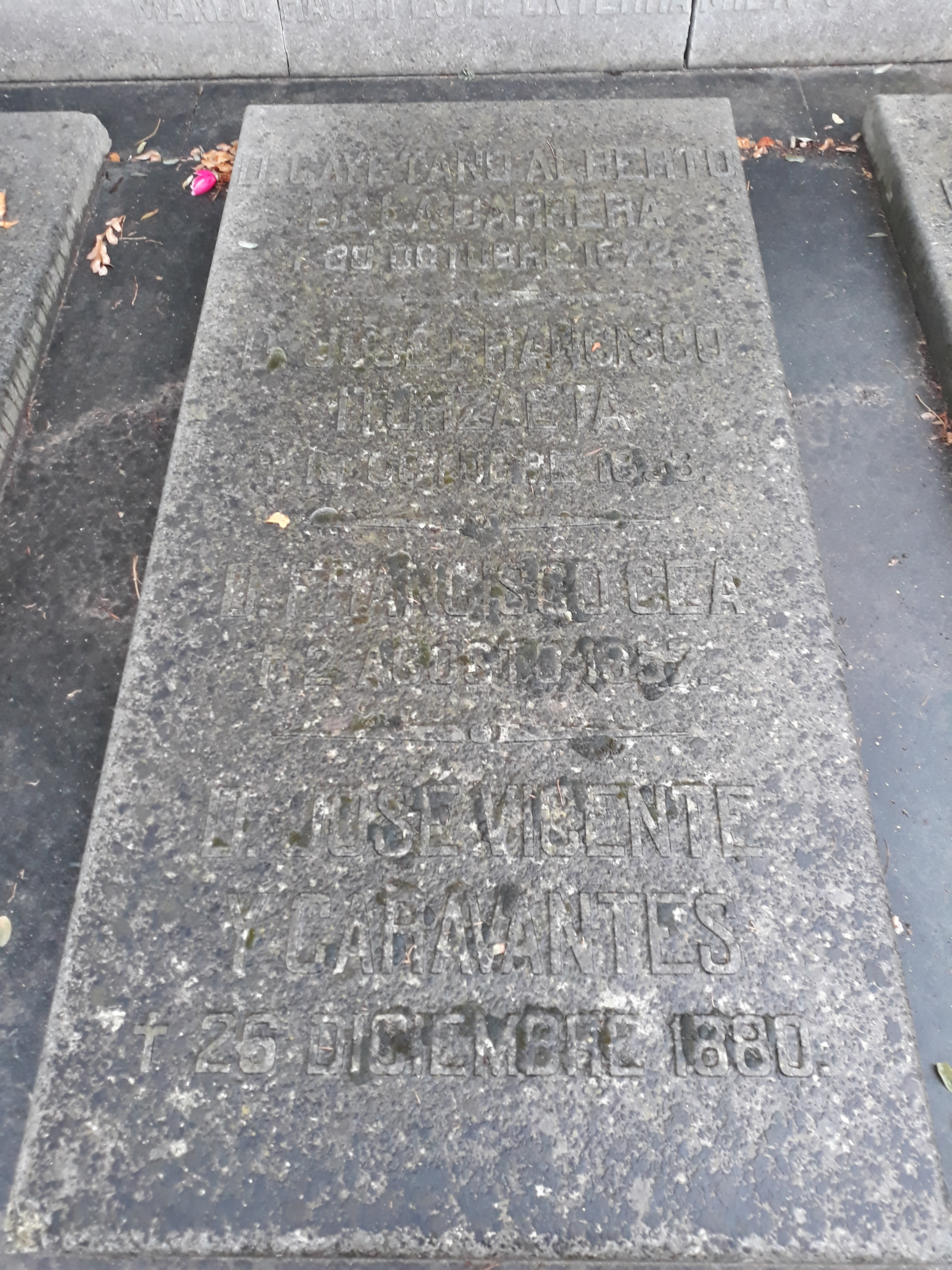 Grabplatte der Umbettungen von aufgelassenen Friedhöfen auf dem Almudena-Friedhof in Madrid (II).